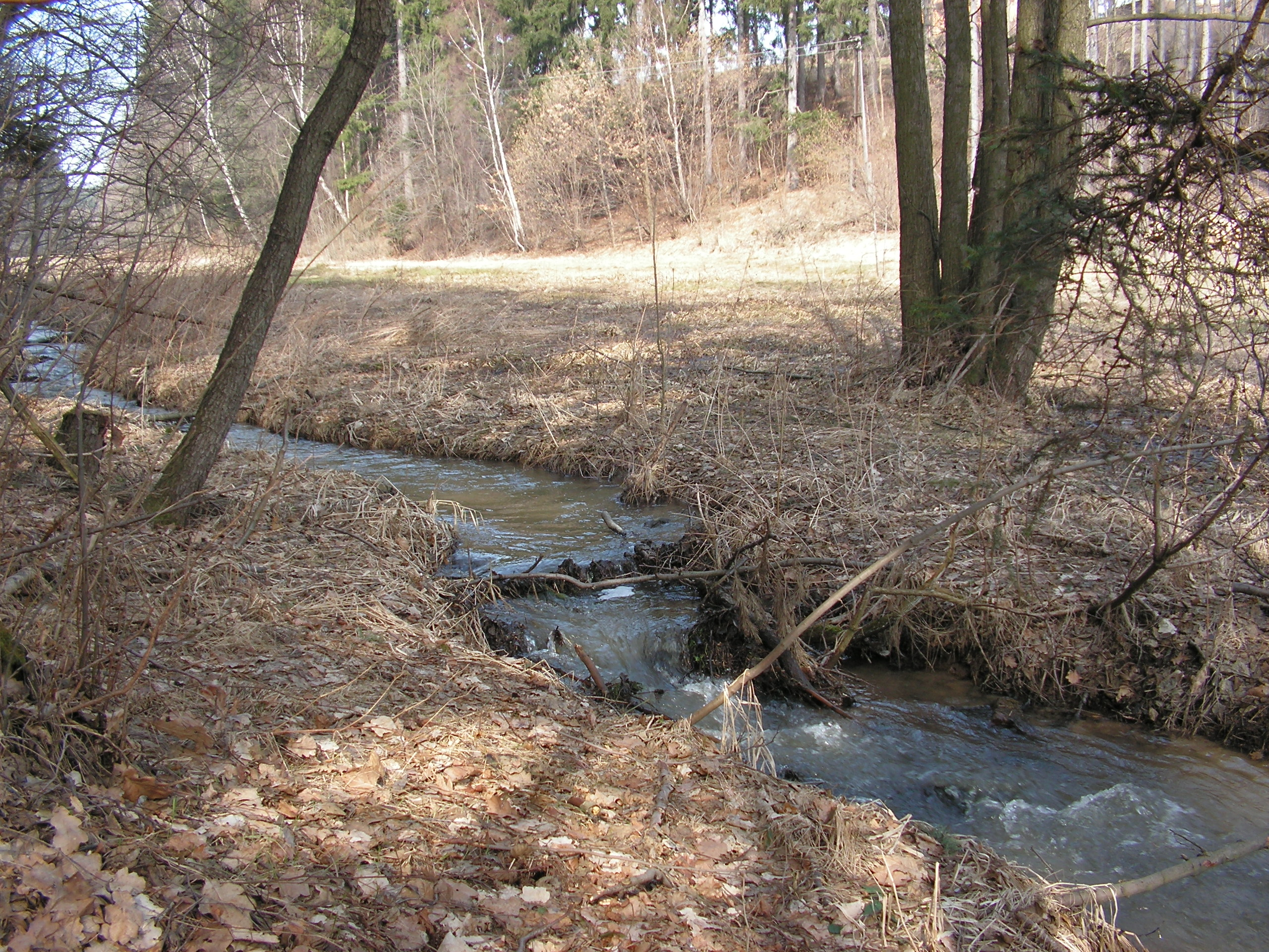 Bohušický potok u Světlé nad Sázavou